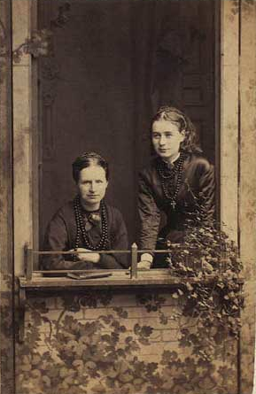 Fotografi